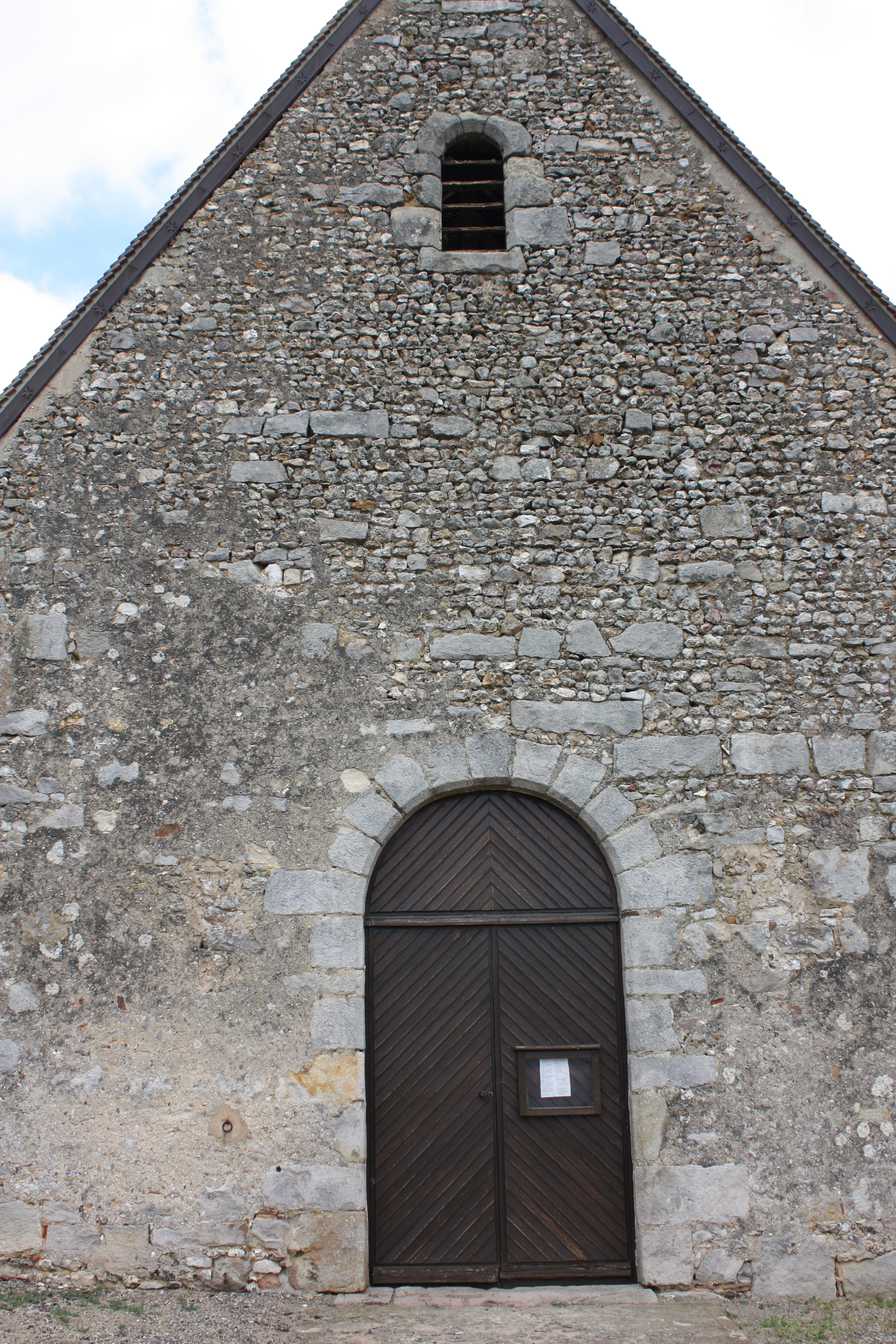 Vaumort - Eglise d'origine romane